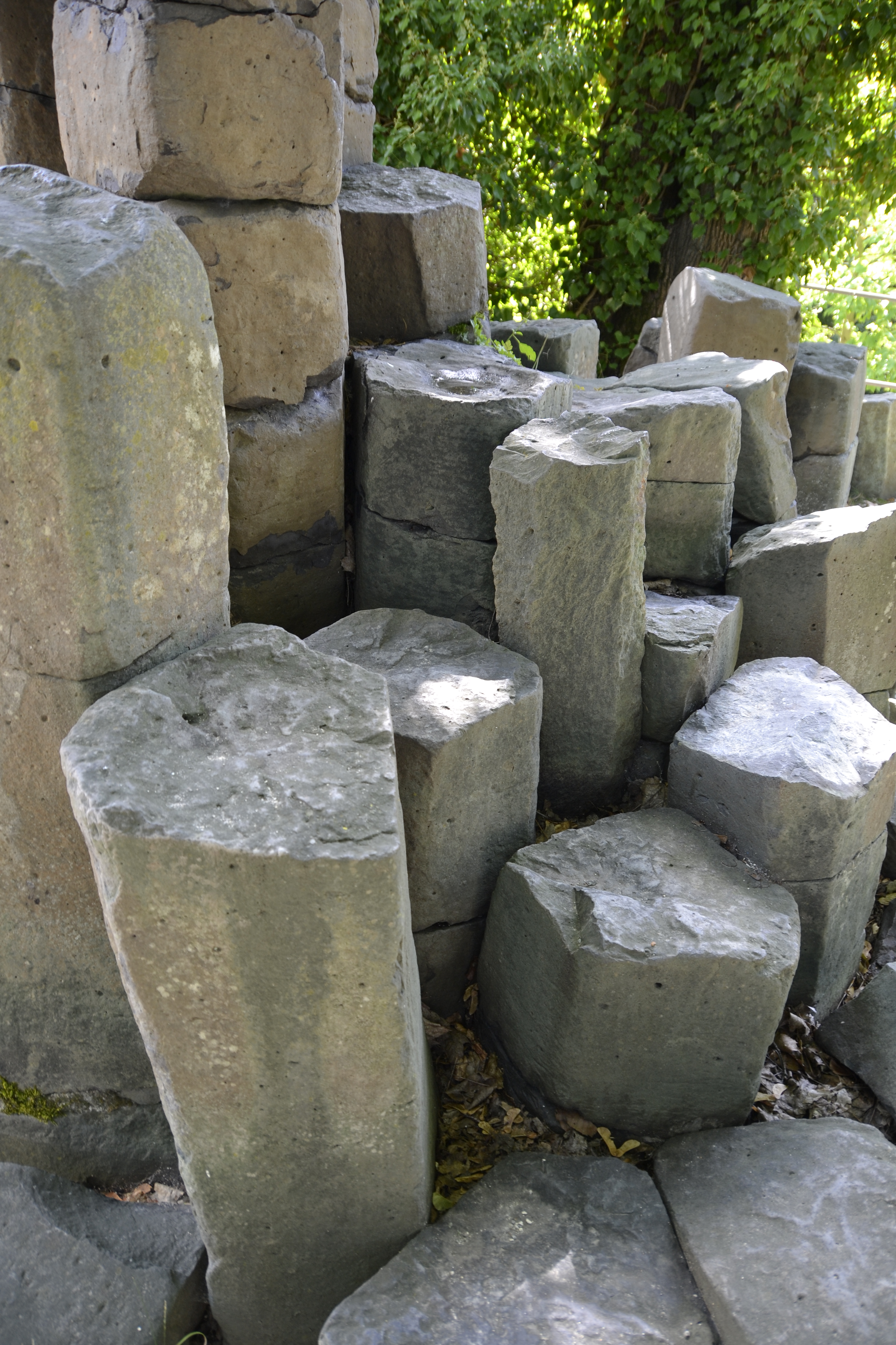 Basaltsäulen aus dem Oberpfälzer Wald - ausgestellt vor dem Naturkundemuseum Ostbayern.